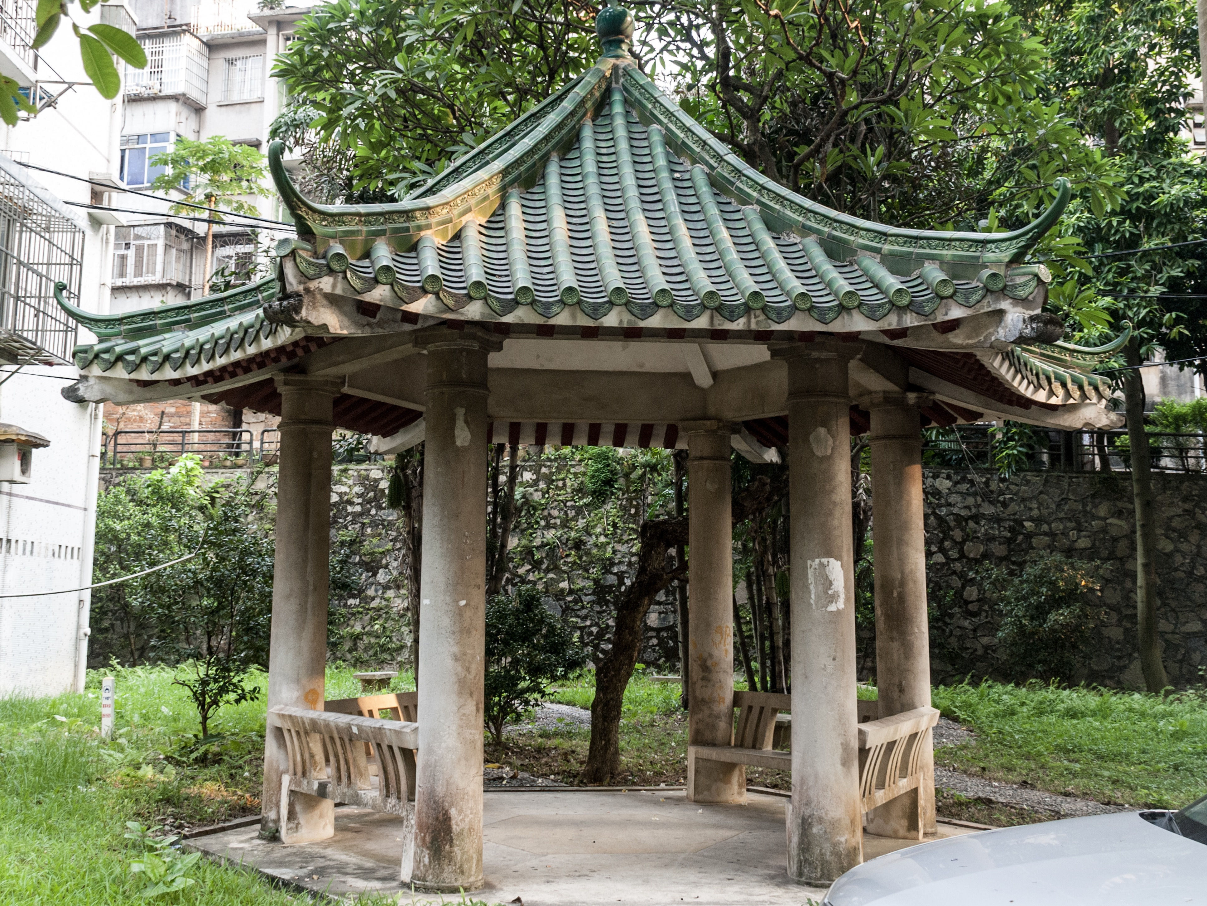 中文（中国大陆）: 位于华南理工大学南区珠江西路南秀村47栋和48栋之间，属中山大学石牌旧址建筑之一。